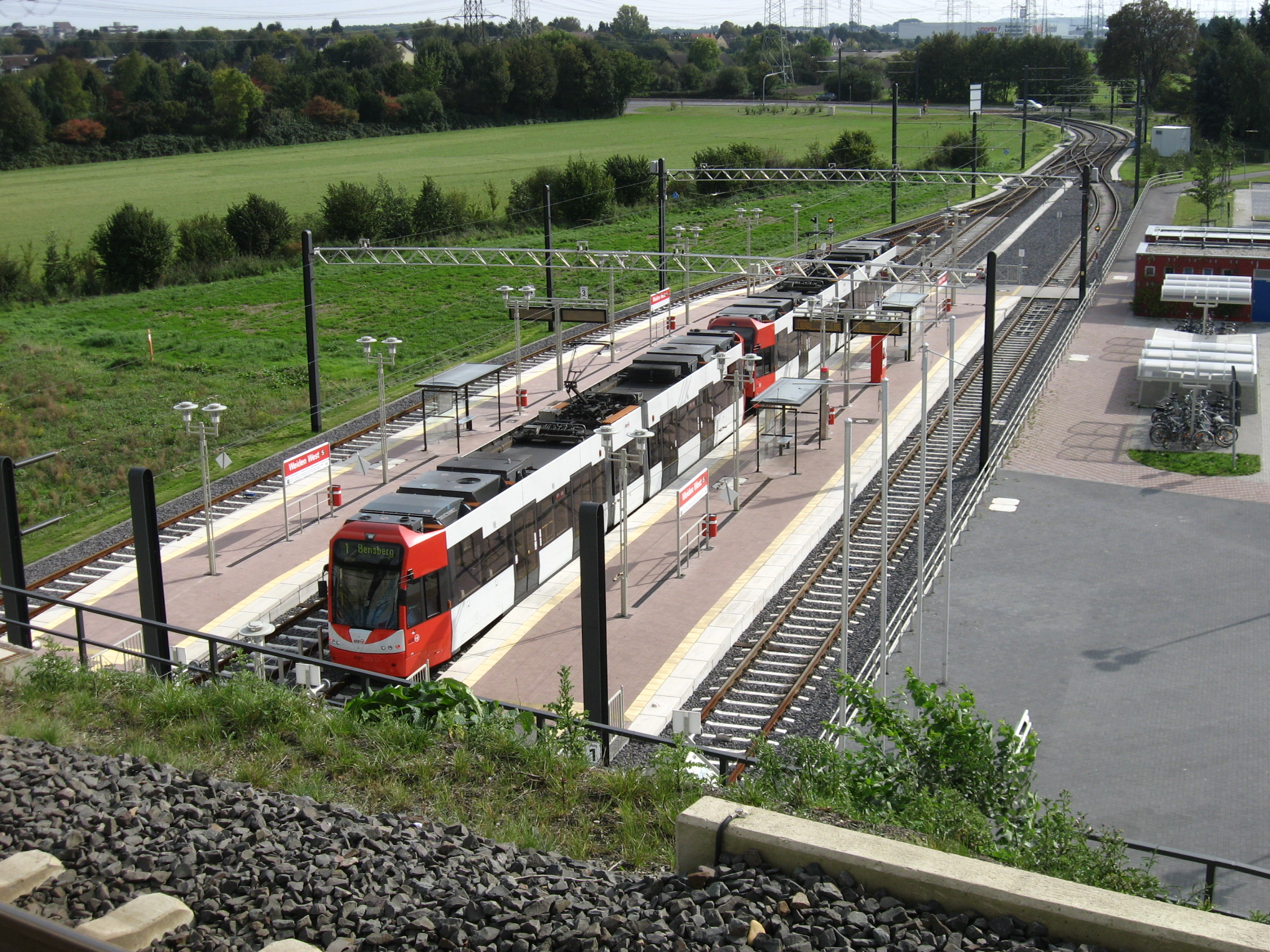 Stadtbahn eindpunt lijn 1 gezien vanaf het S-bahn station.